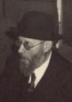 ייִדיש: הרב זכריהו עלעפאנט